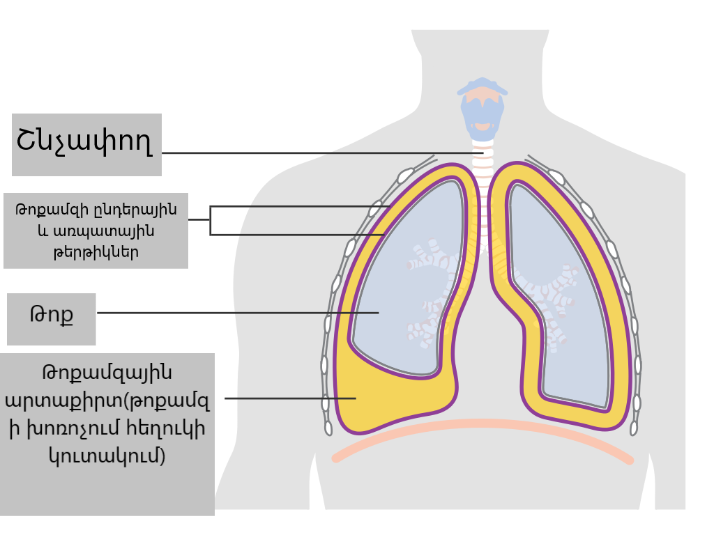 Դիագրամում ցուցադրված է թոքամզի խոռոչում, թոքամզի երկու թերթիկների միջև հեղուկի կուտակումը։